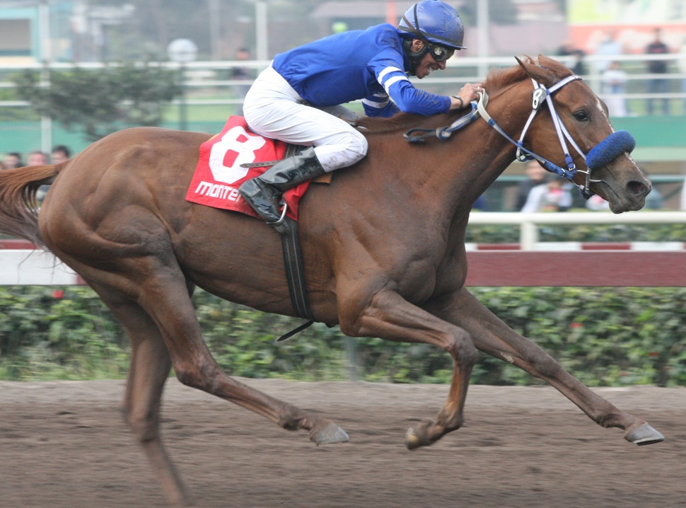 Almudena Polla de potrancas Grupo (I)